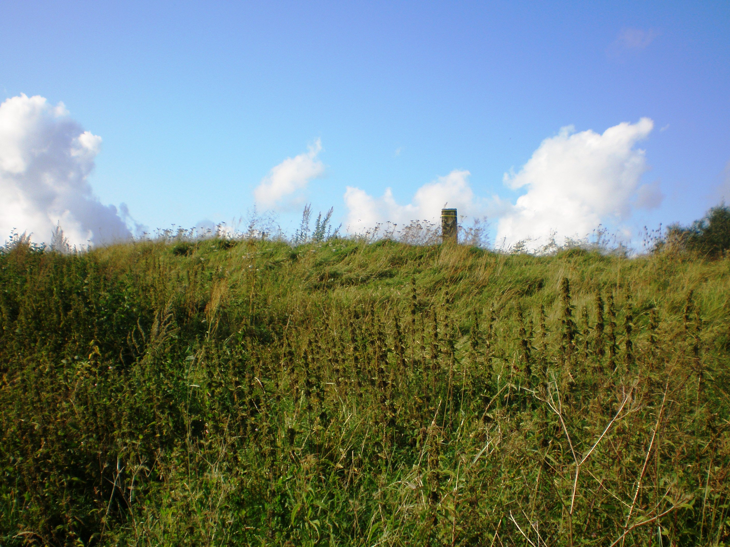 Ambraziūnų piliakalnis, Kėdainių raj., Lietuva